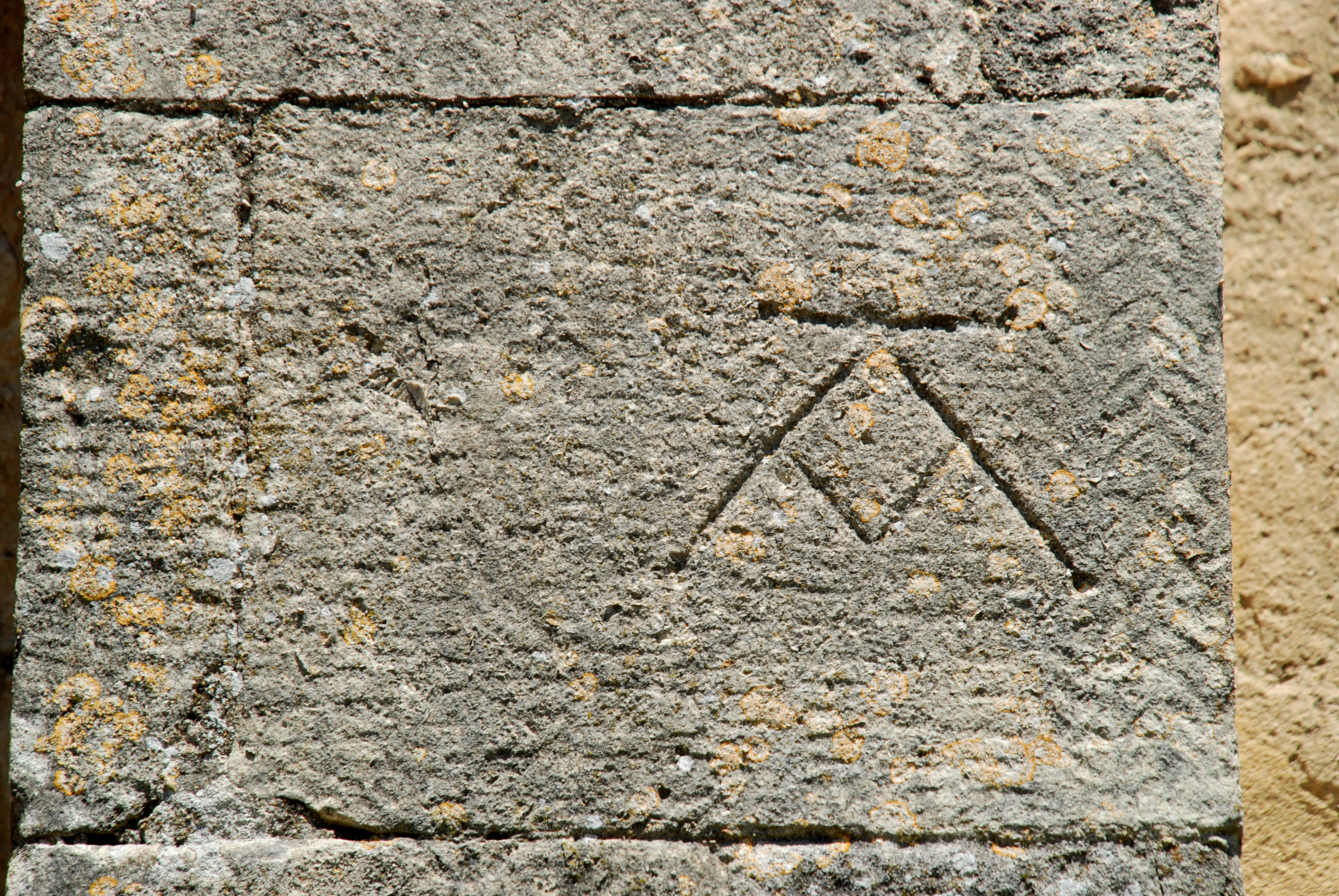 France - Église Saint-Pierre-ès-Liens de Colonzelle